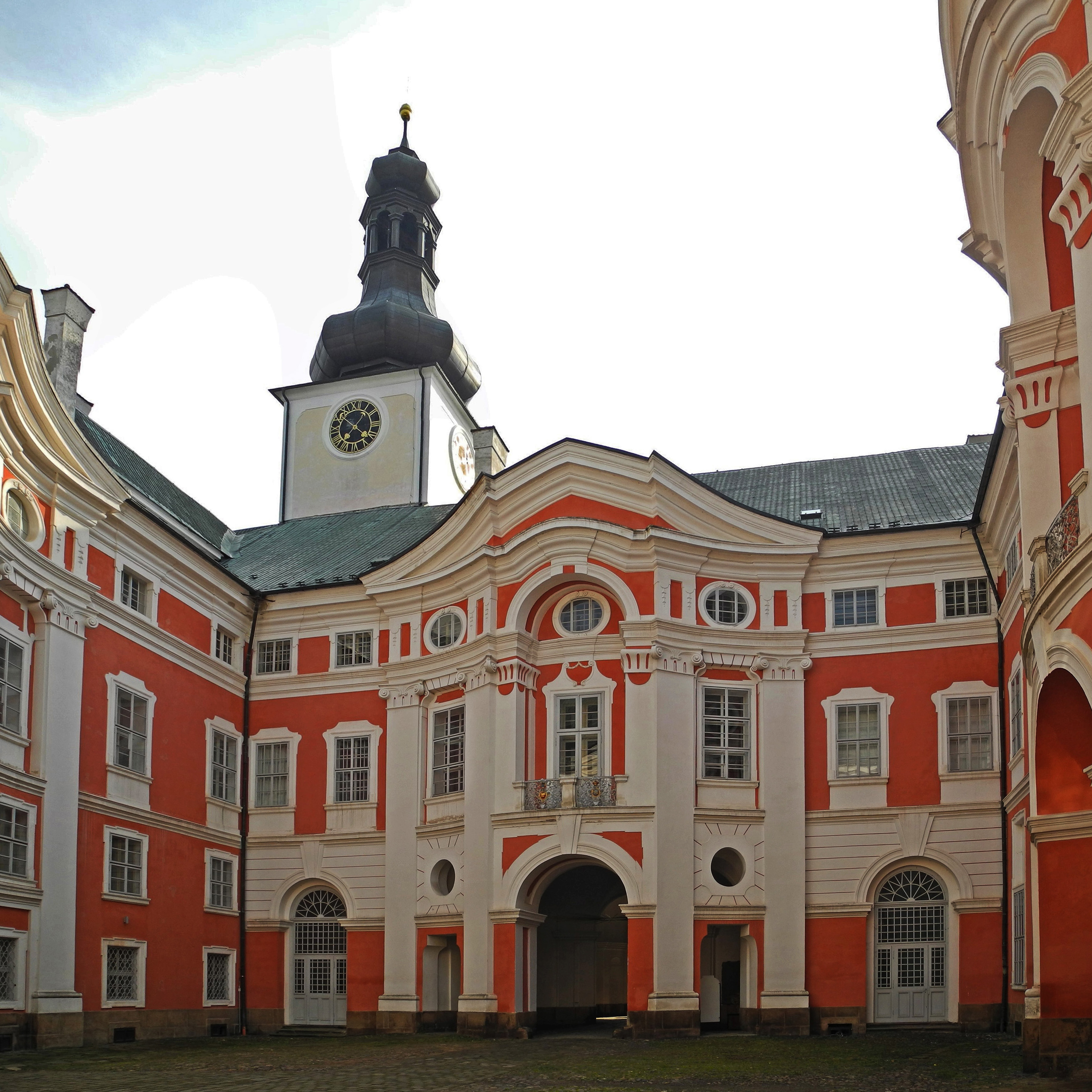 Innenhof in der Benediktiner-Abtei Braunau (Broumov)